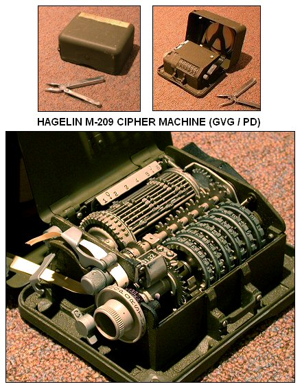 Hagelin M-209 Codeermachine. Foto van Engelstalige Wikipedia, vrijgegeven voor publicatie door Greb Goebel